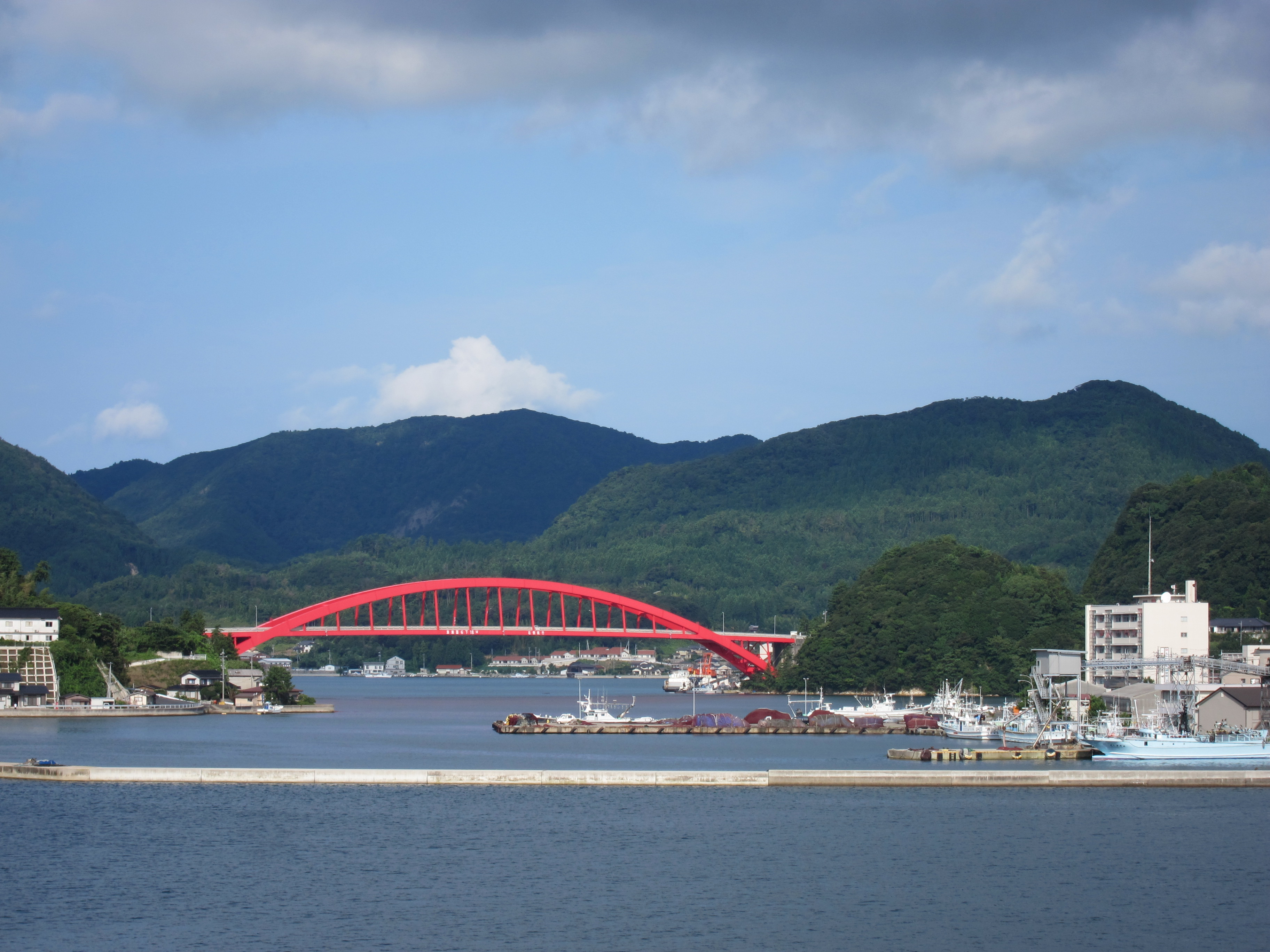 西郷港西部にかかる西郷大橋